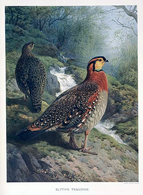 Blyth's Tragopan (Tragopan blythi blythi)